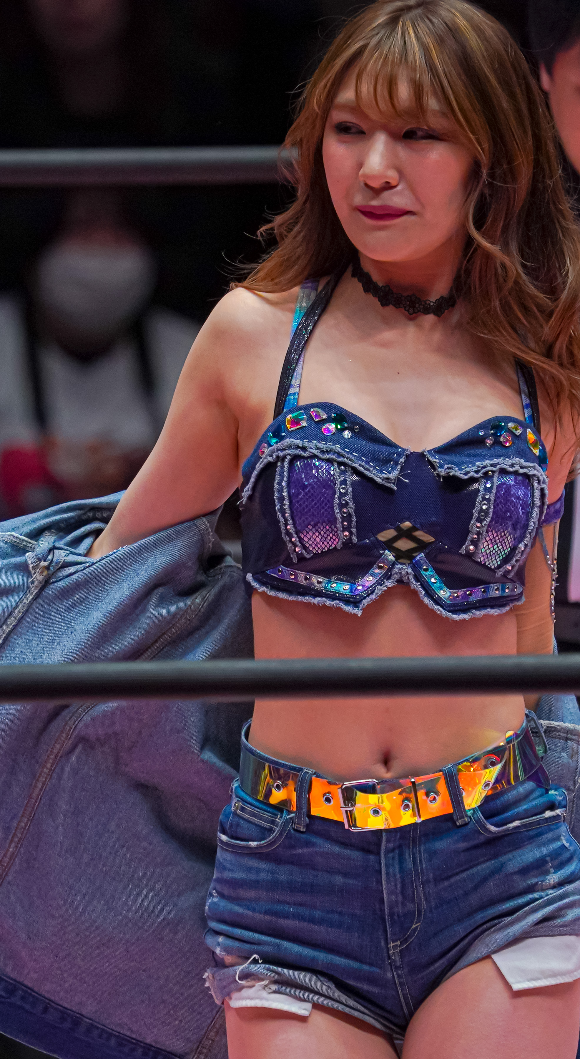 2020.01.04 後楽園ホール